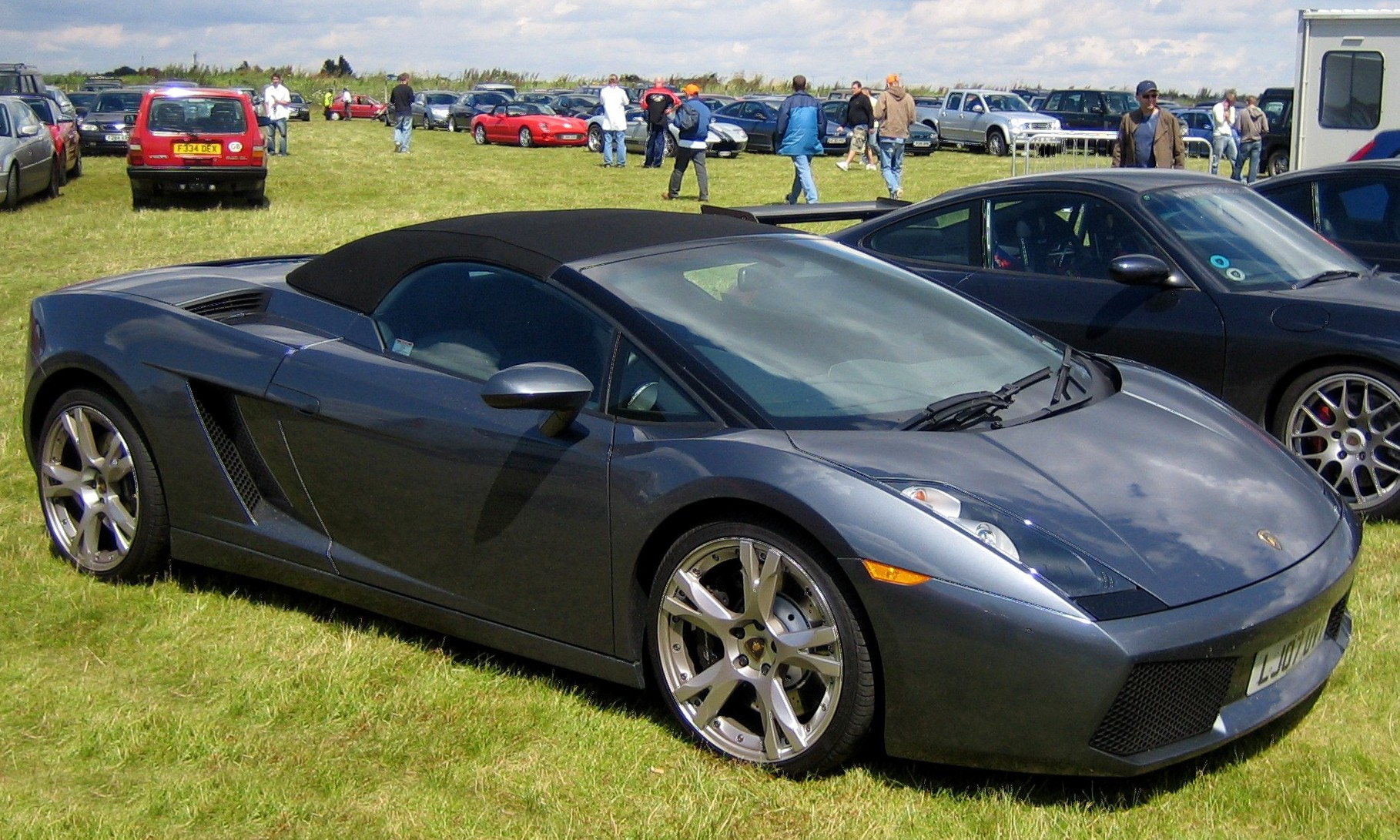 Lambo_Gallardo_Spyder_in_Norfolk